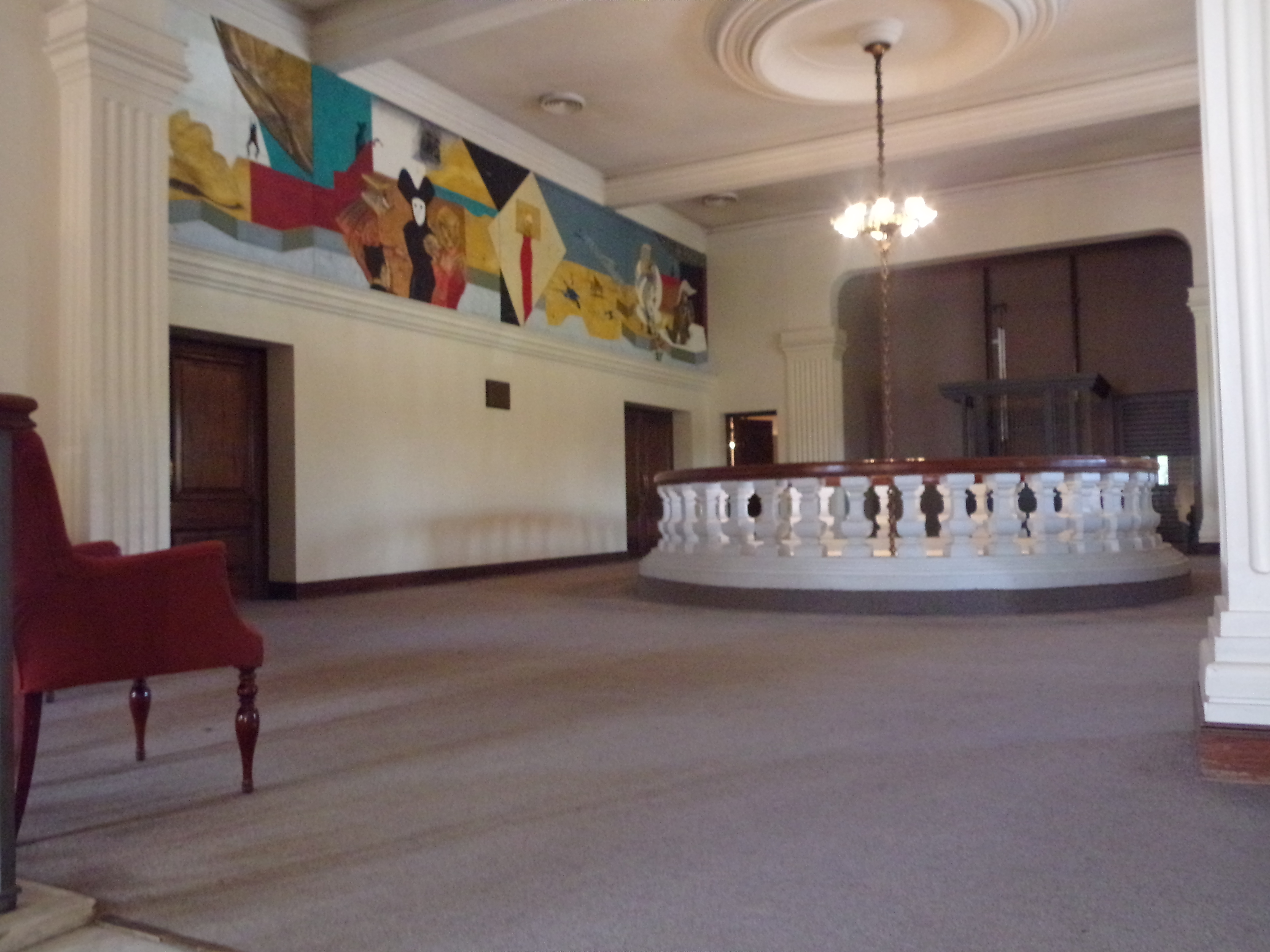 Lucero Nazaret, 17 años, escuela 4-151 Dr. Benito Marianetti Lujan de Cuyo Mendoza